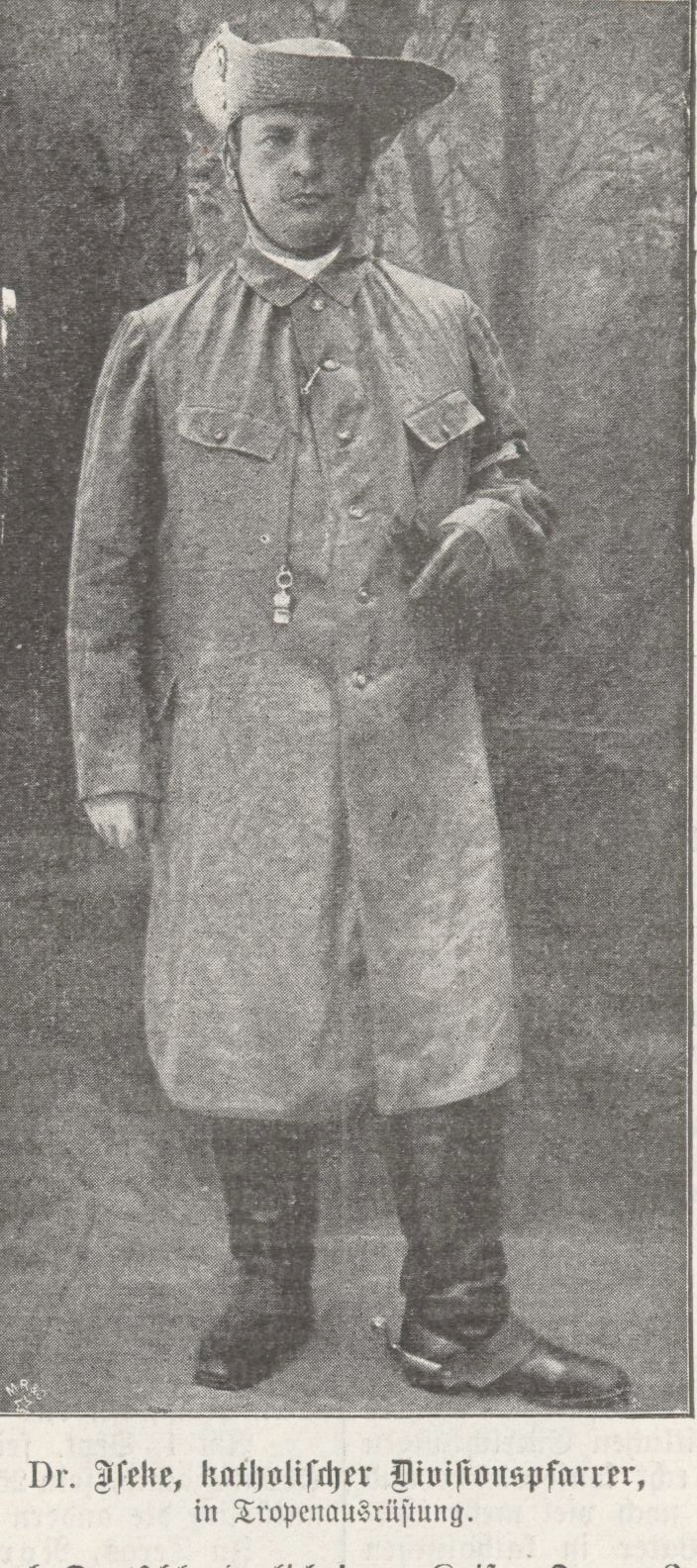 Dr. Hermann Iseke, kath. Priester, Feldgeistlicher und Heimatdichter